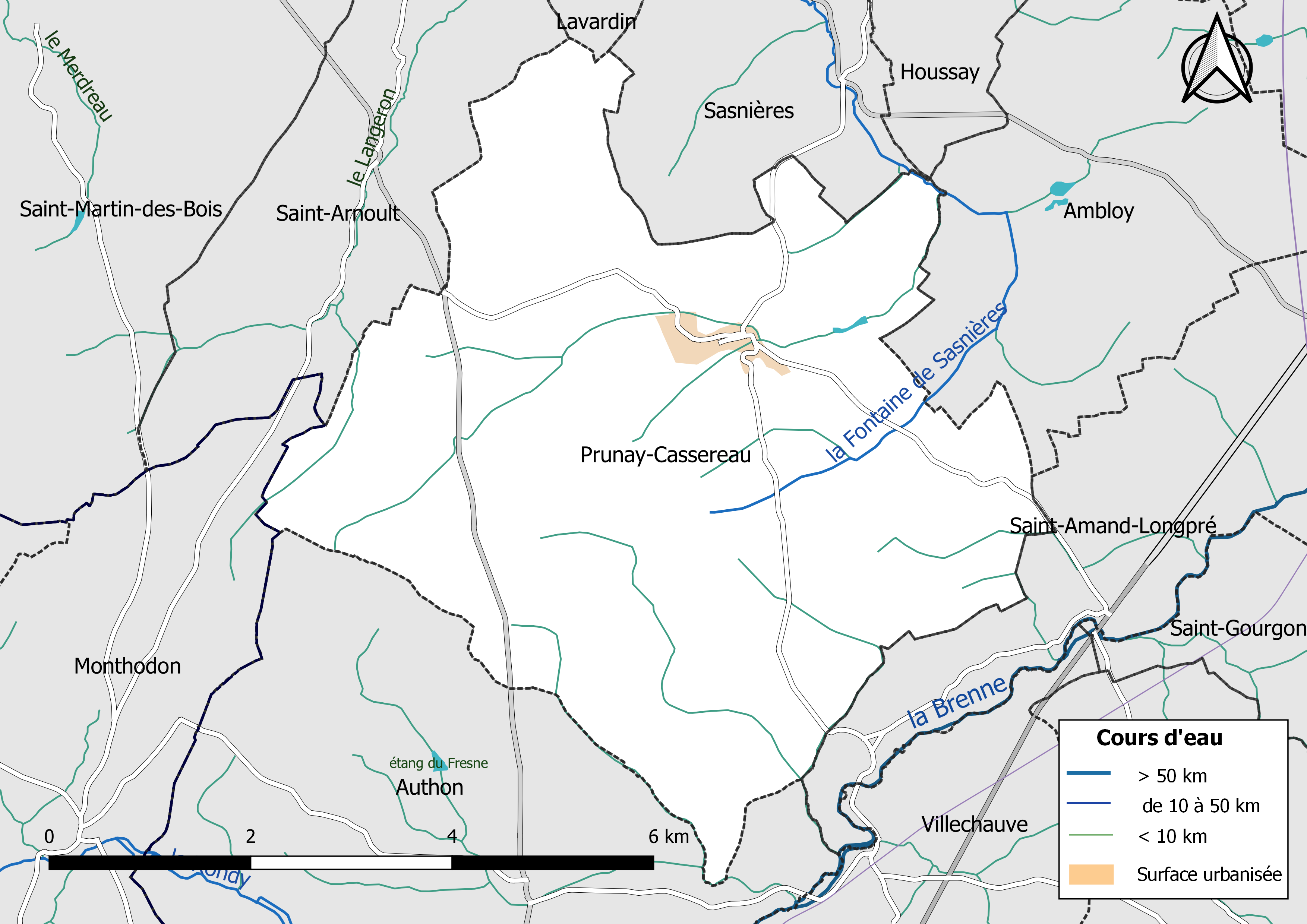 Carte du réseau hydrographique de la commune de Prunay-Cassereau (Loir-et-Cher, France).